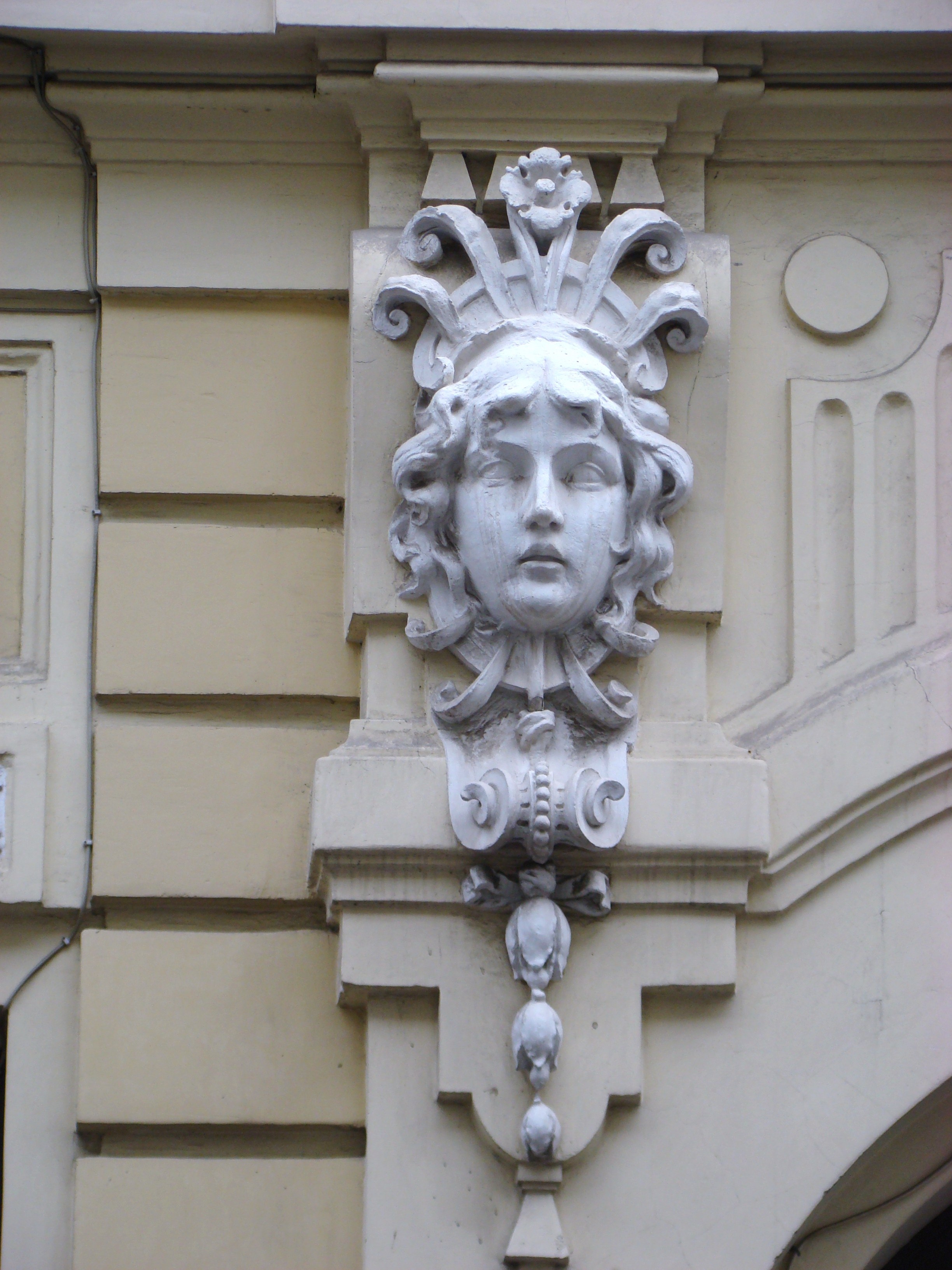 Palatele "Status-ului romano-catolic" 02